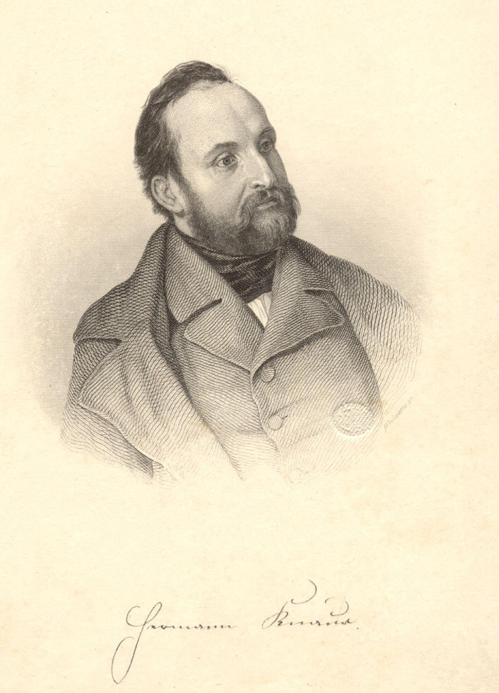 Hermann Knaur, Bildhauer (Stahlstich von P. Wuster)